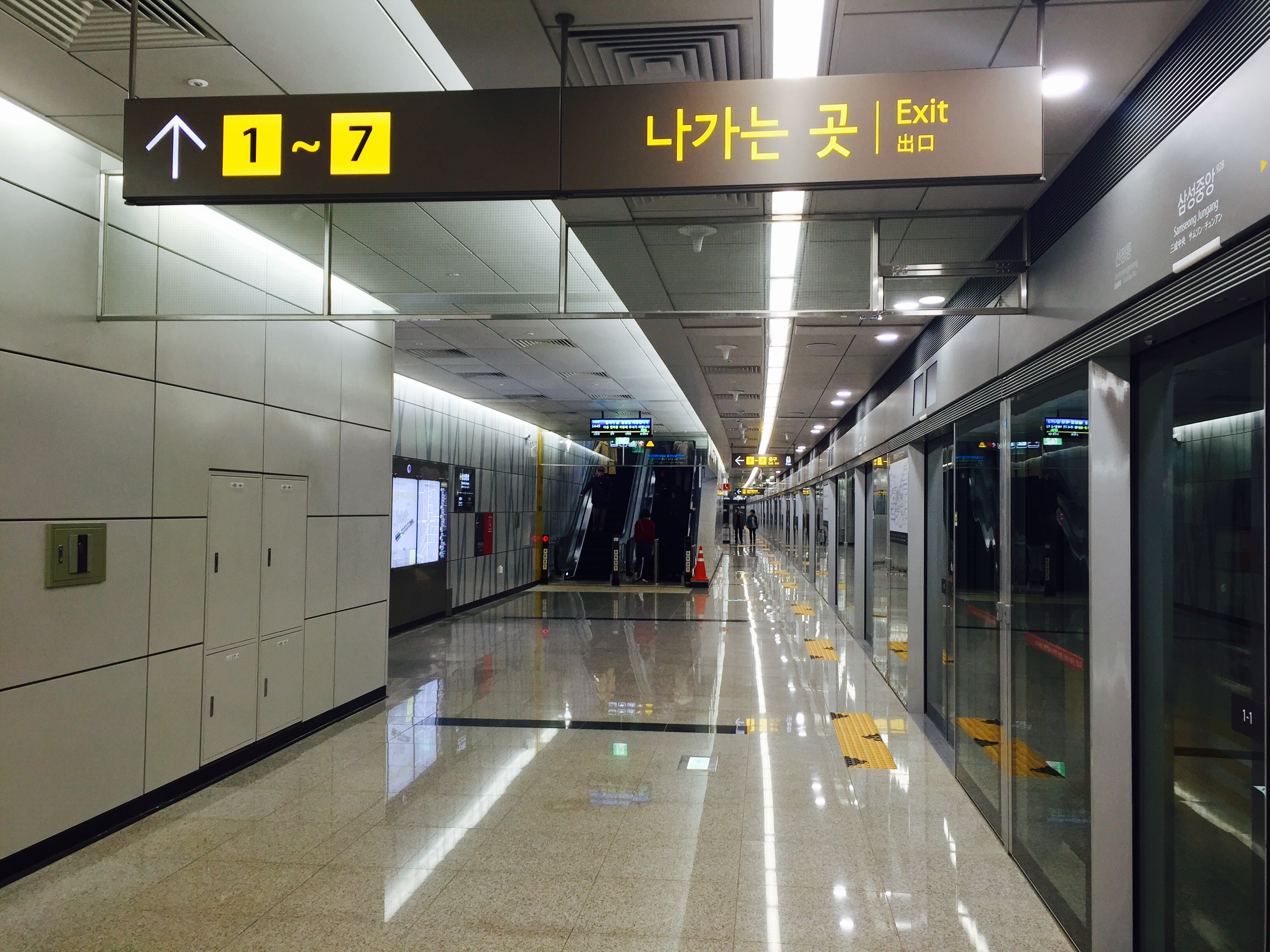 삼성중앙역 승강장